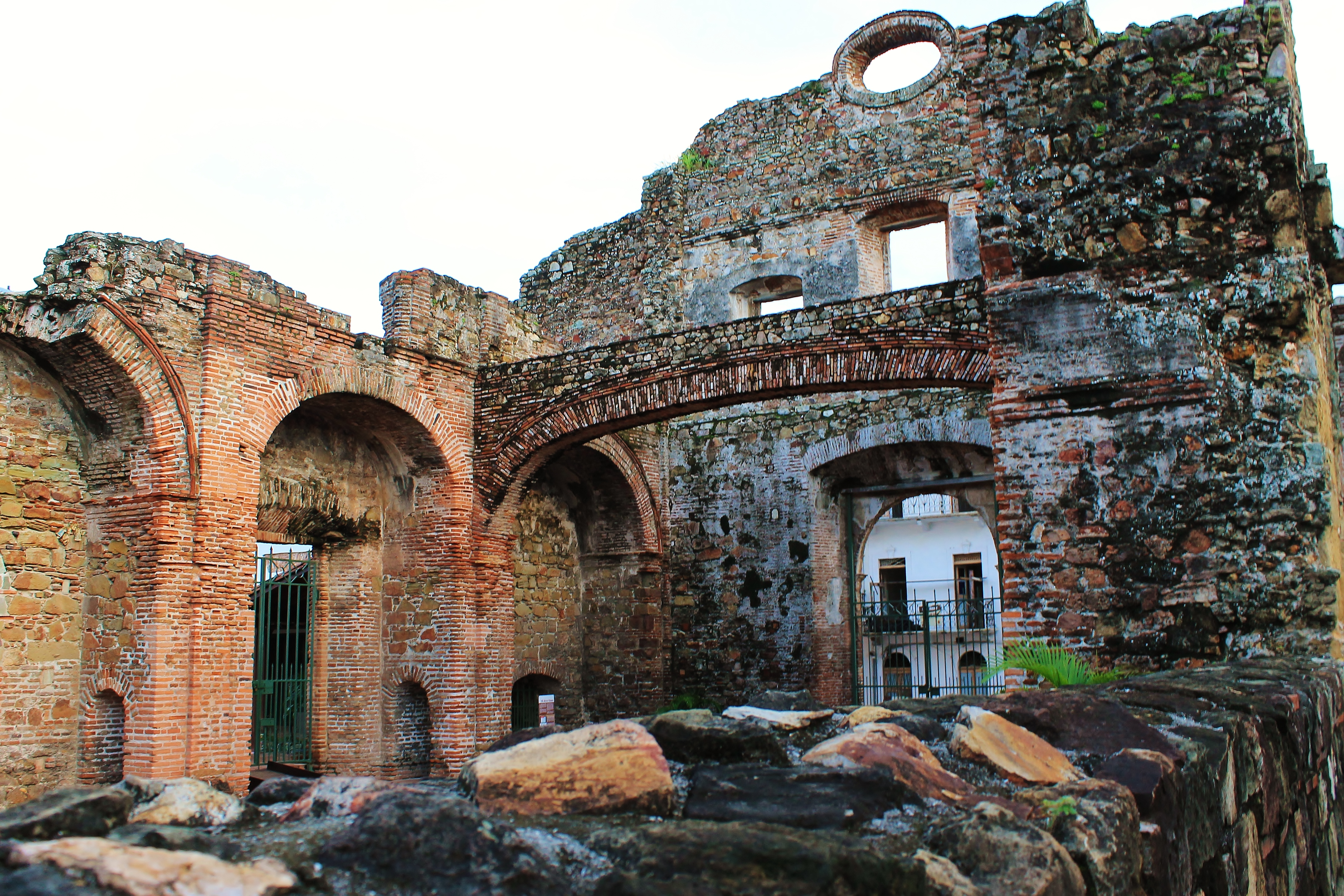 El arco chato se encuentra en la Iglesia de Santo Domingo, construída en 1978. Se destruyó tras dos incendios, quedando solo los muros y su arco, el cual sirvió para demostrar la estabilidad sísmica que hay en el país.